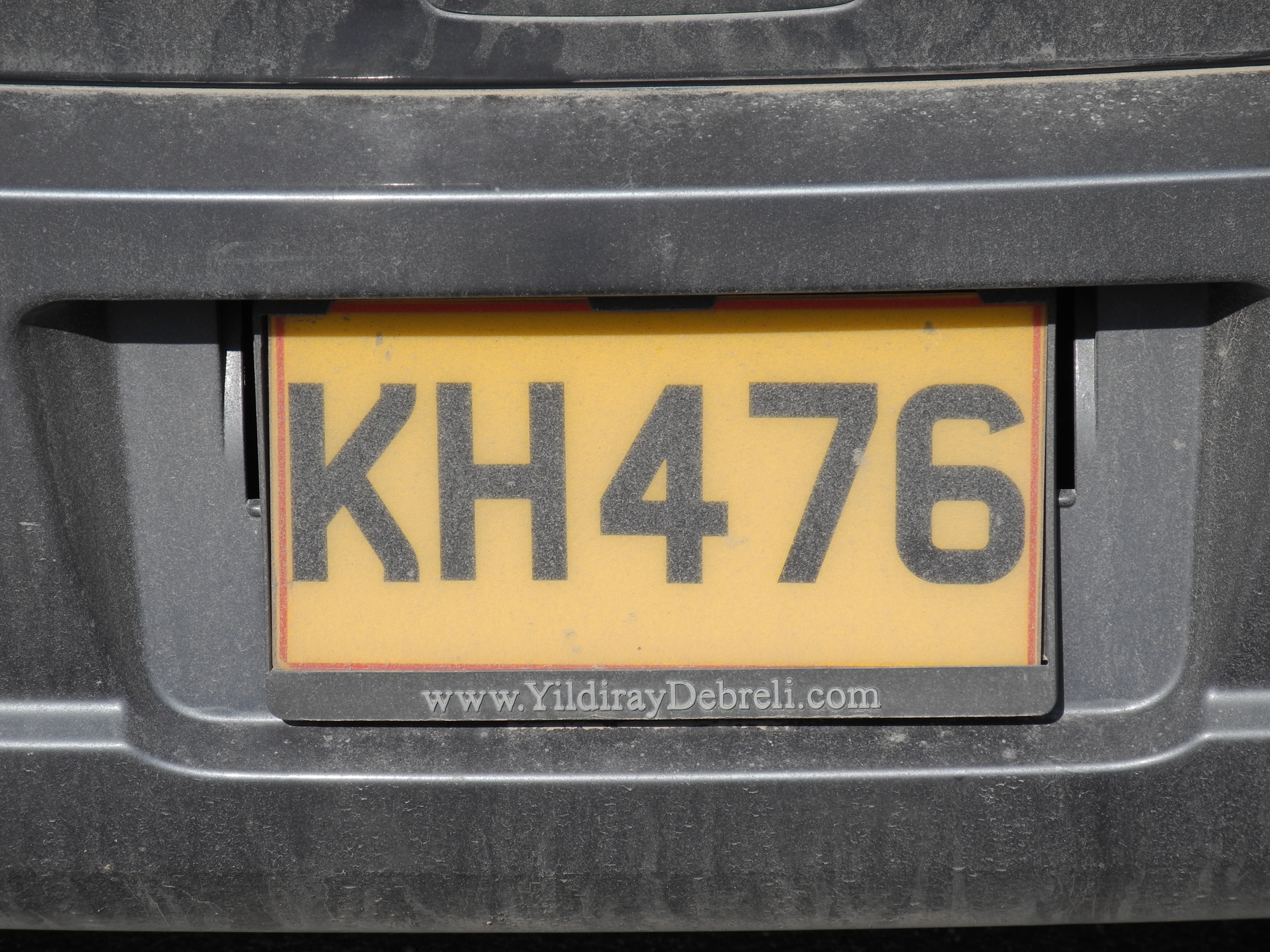 License plates of Cyprus